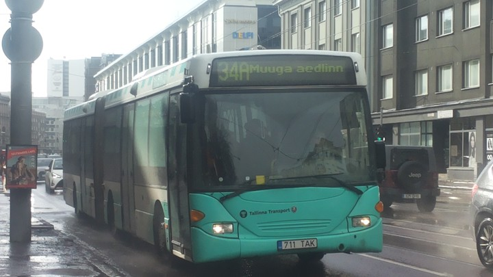 34A. Bussiliin sõitmas Muuga Aedlinna Narva maanteel